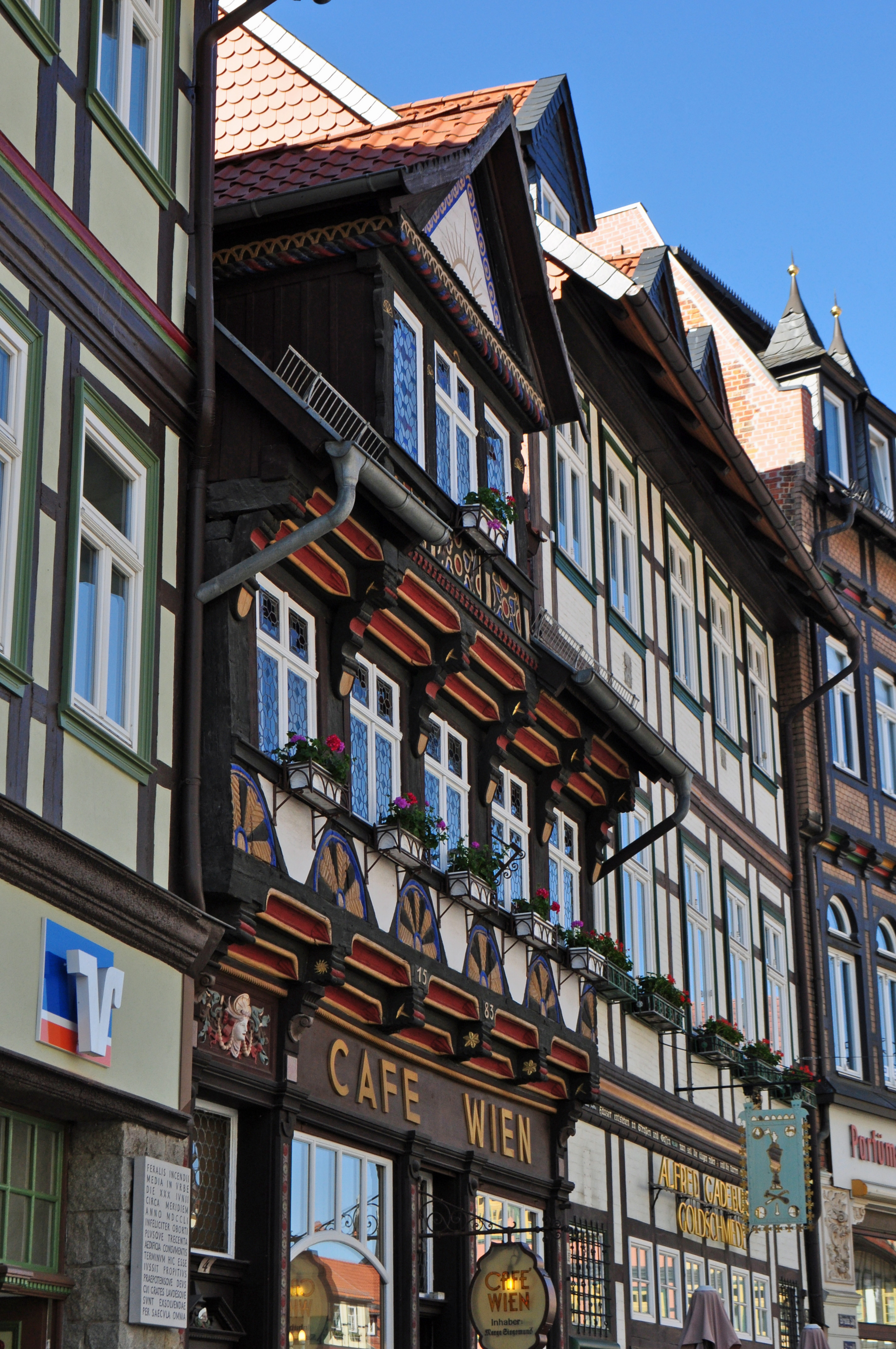 Café Wien